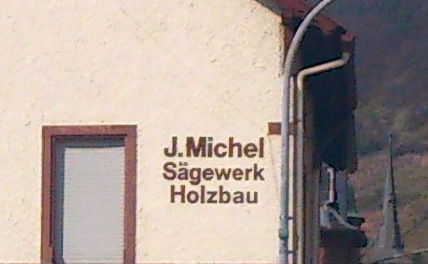 Fassadenwerbung in Klingenberg für das Sägewerk der Familie Michel